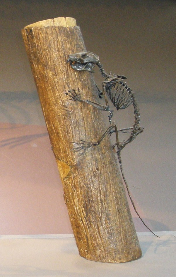 Fossil of Plesiadapis, an extinct plesiadapiform Took the photo at Musee d'Histoire Naturelle, Brussels